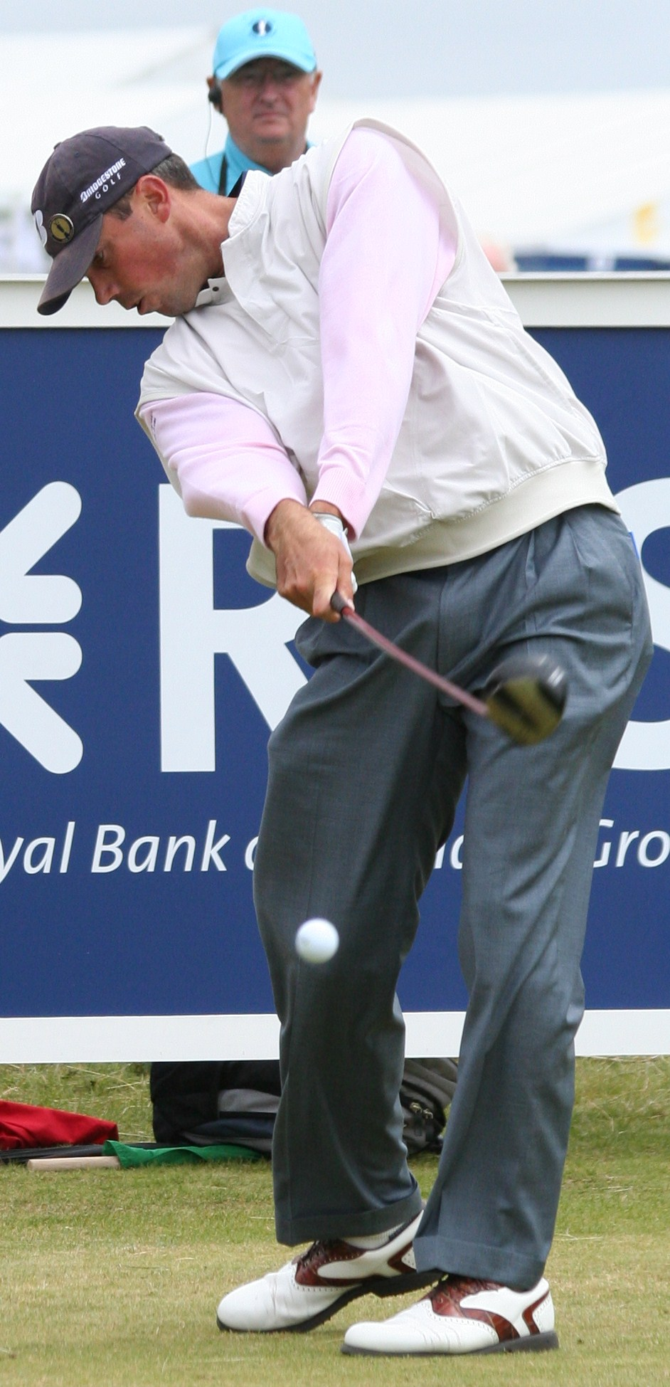 Matt Kuchar, Open 2008